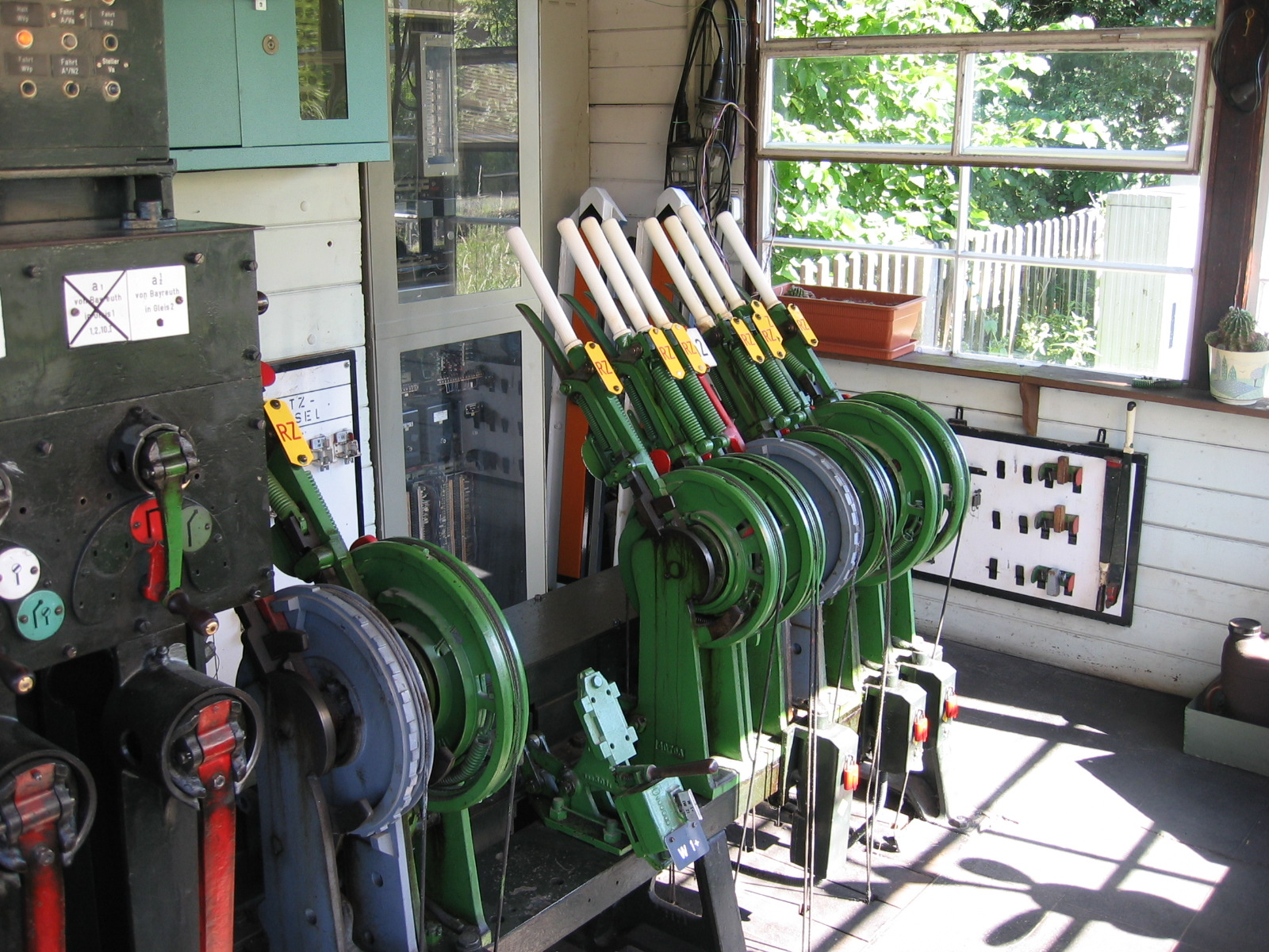 Detail des Stellwerks im Bahnhof Bindlach (Bauform Jüdel), links angeschnitten ein Kurbelwerk